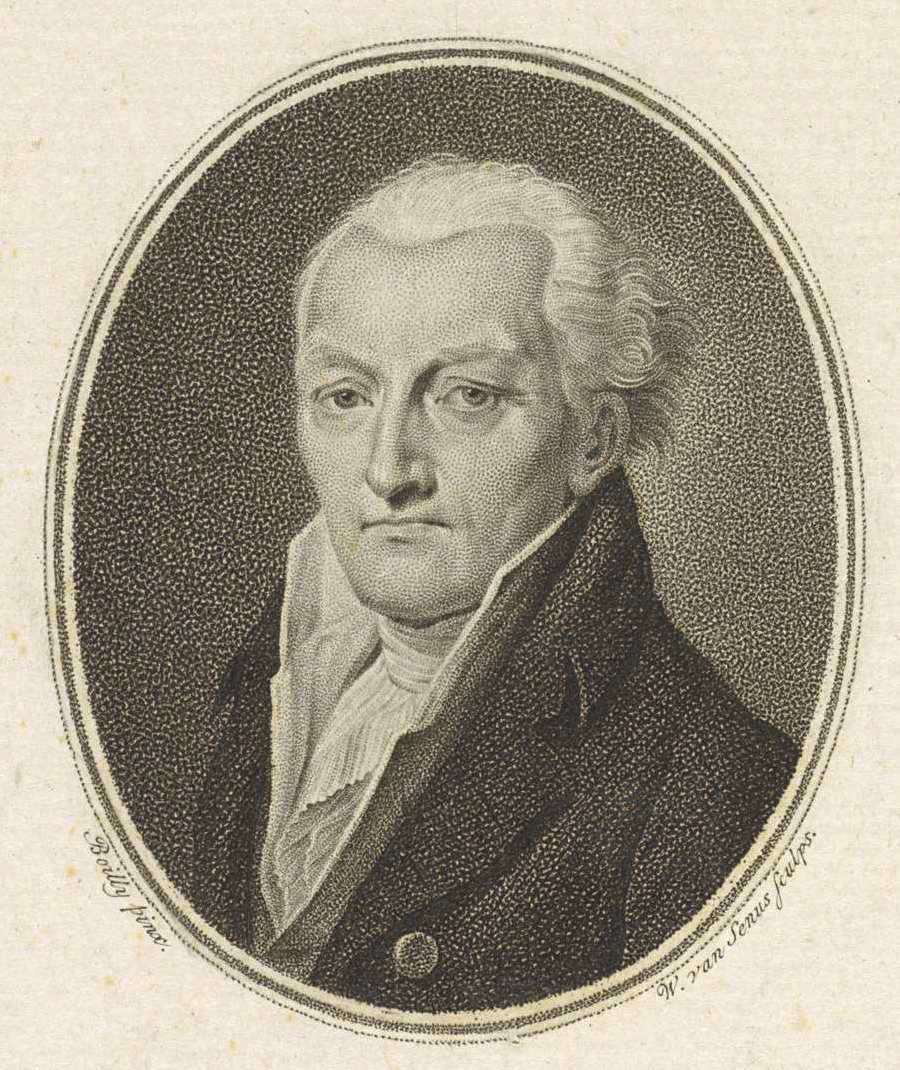 Portret van Johan Meerman (cropped)